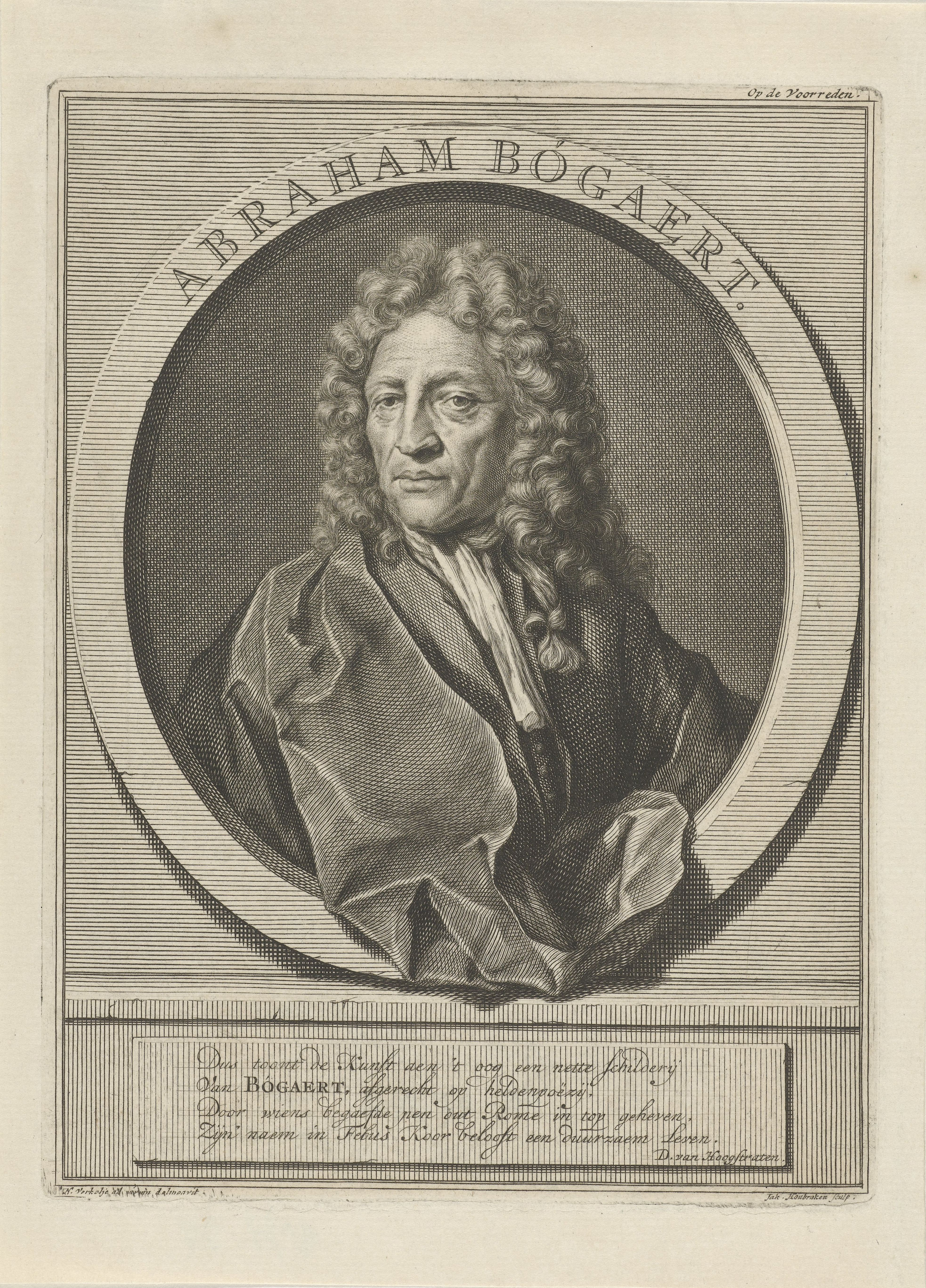 IdentificatieTitel(s): Portret van Abraham BogaertAbraham Bogaert (titel op object)Objecttype: prent Objectnummer: RP-P-OB-48.842Catalogusreferentie: Ver Huell 37FMP 516-dOpschriften / Merken: verzamelaarsmerk, verso, gestempeld: Lugt 2228Omschrijving: Buste van Abraham Bogaert in een architectonisch, illusionistisch driedimensionaal ovaal Waar: op zijn naam, waarbij zijn mantel over de rand steekt. Onder het portret een plint waarop een plaquette met een vierregelig vers in het Nederlands. Rechtsboven: Op de voorreden.VervaardigingVervaardiger: prentmaker: Jacob Houbraken (vermeld op object)naar tekening van: Nicolaas Verkolje (vermeld op object)schrijver: David Fransz. van Hoogstraten (vermeld op object)Plaats vervaardiging: AmsterdamDatering: 1708 - 1727Fysieke kenmerken: gravureMateriaal: papier Techniek: graveren (drukprocedé)Afmetingen: plaatrand: h 183 mm × b 136 mmOnderwerpWie: Abraham BogaertVerwerving en rechtenVerwerving: onbekendCopyright: Publiek domein